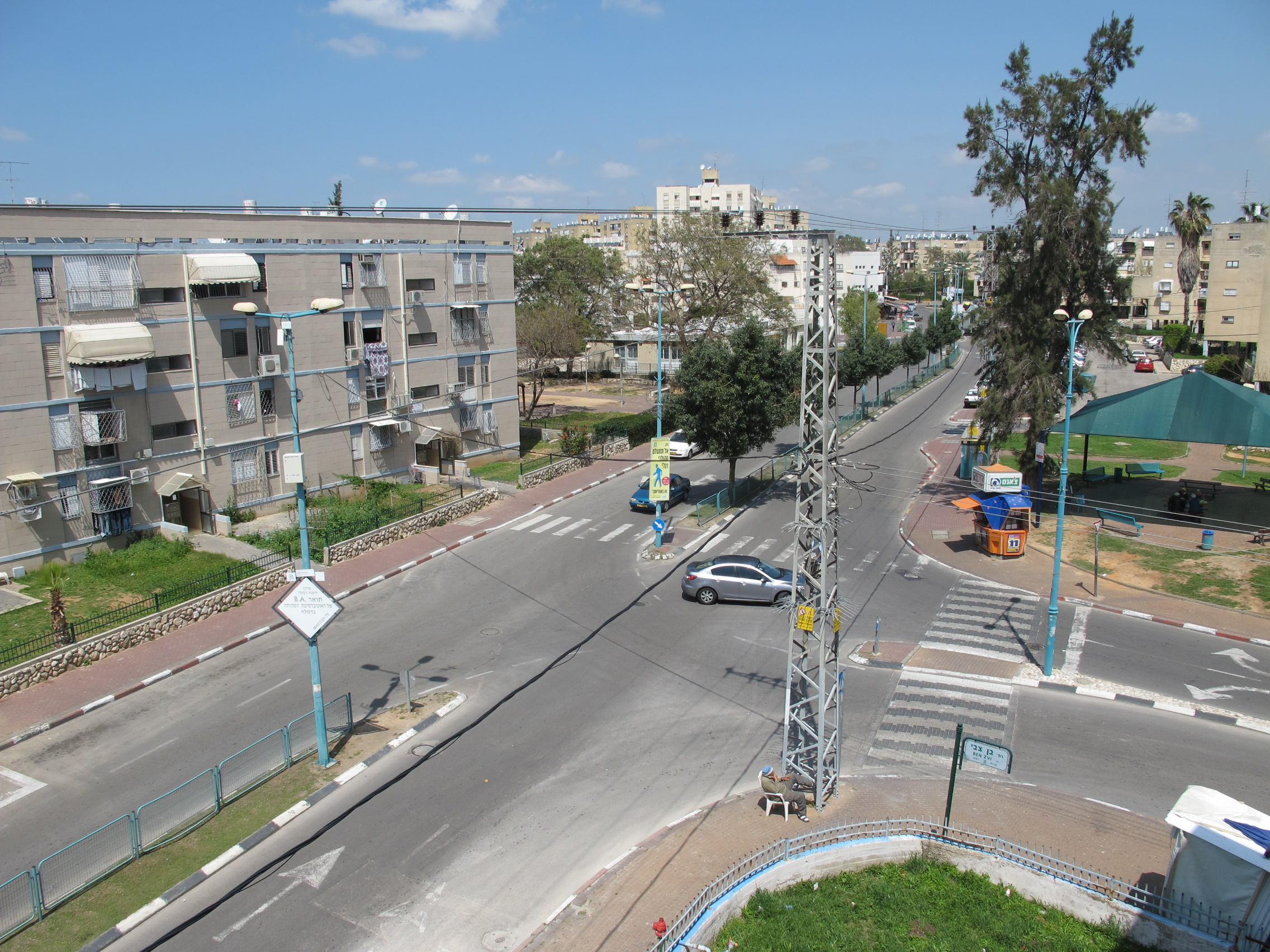 רחוב טיפוסי במרכז העיר רמלה.